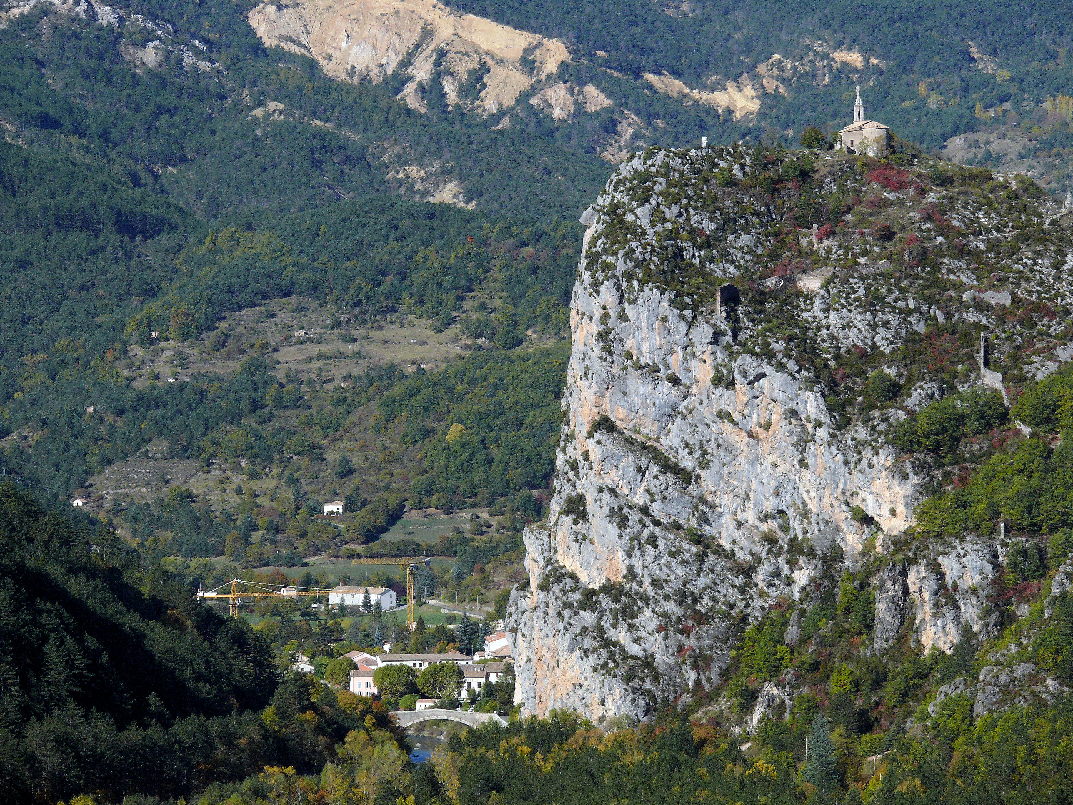 Castellane - Le Roc et le pont du Roc